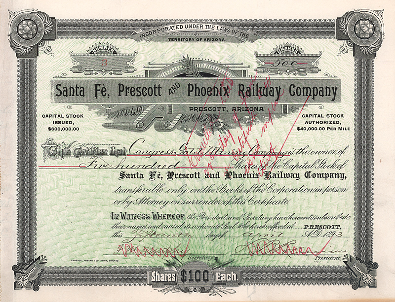 Share of the Santa Fe, Presott & Phoenix Railway Company from the 15. April 1893